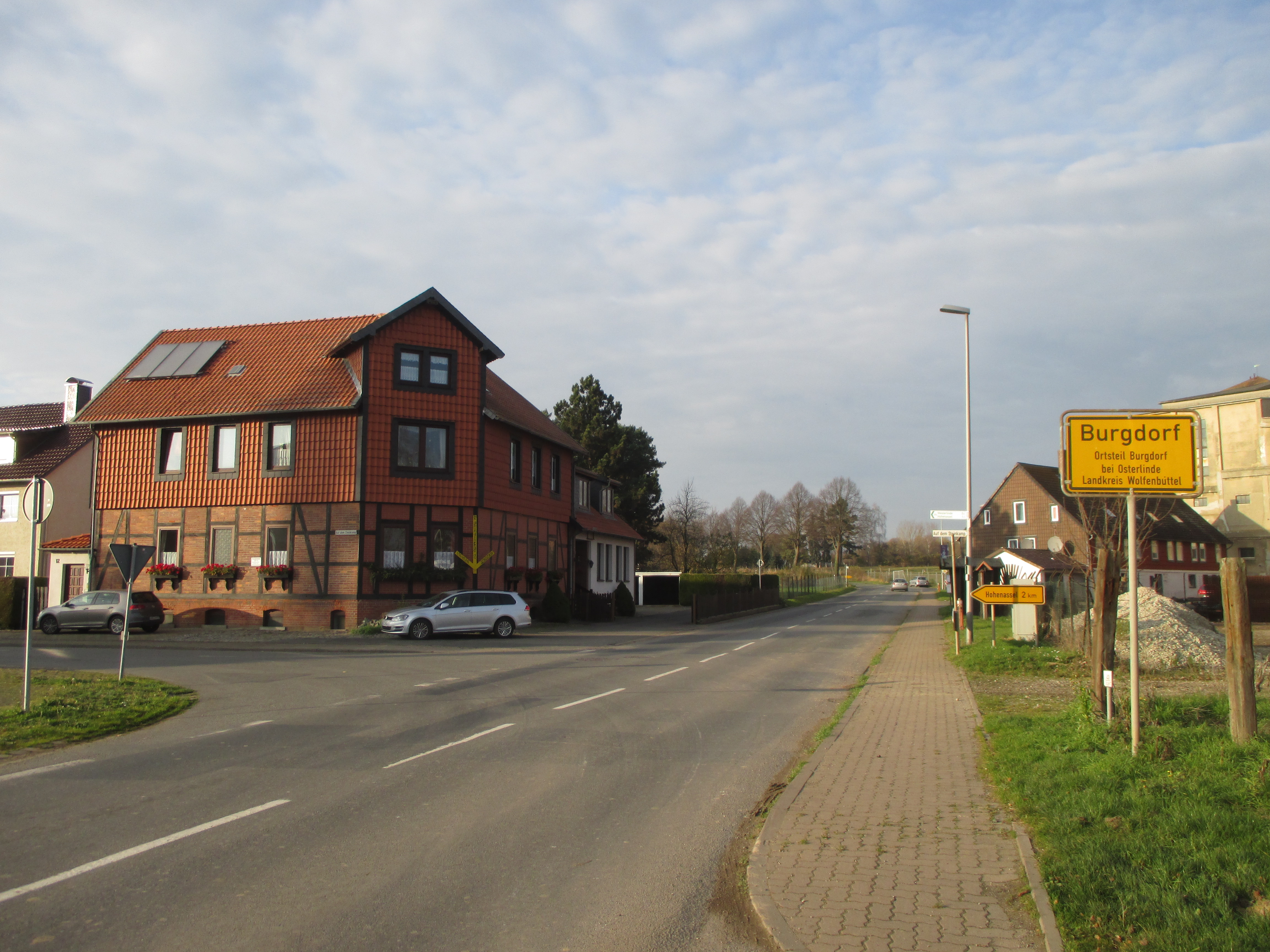 Ortskern von Burgdorf bei Osterlinde (auch Kreidewerk oder Burgdorf-Bahnhof genannt, Gemeinde Burgdorf, Landkreis Wolfenbüttel